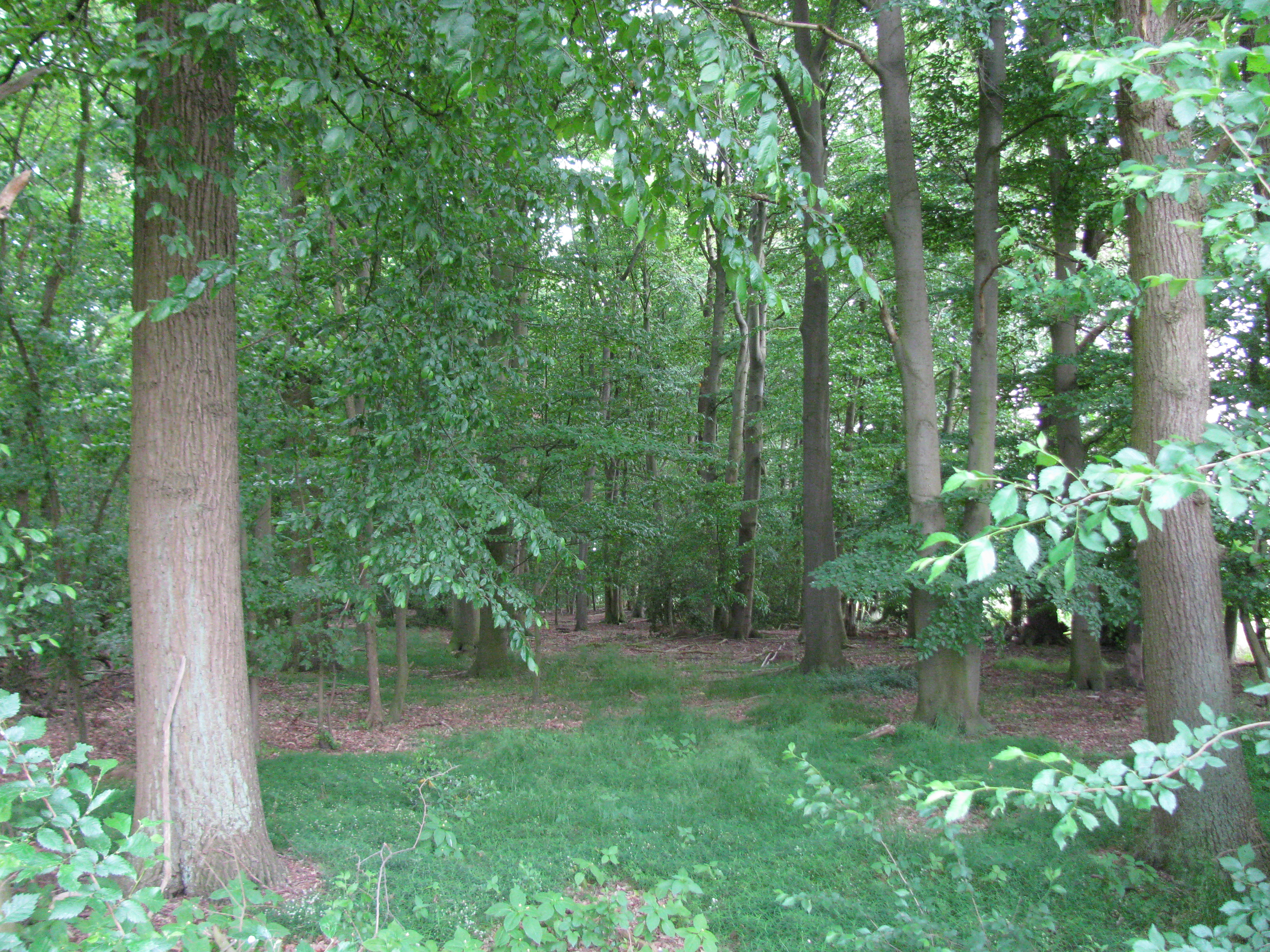 Blick in den Quellwald bei Bennemühlen